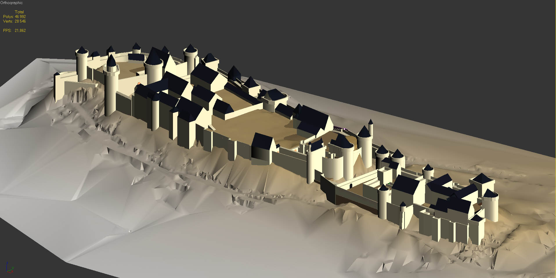 Il s'agit d'une vue de la borne interactive retraçant les évolutions architecturales de la forteresse de Chinon à travers les siècles. En l'occurrence, la photo présente la forteresse telle qu'elle était à l'époque de Charles VII (XVe siècle).